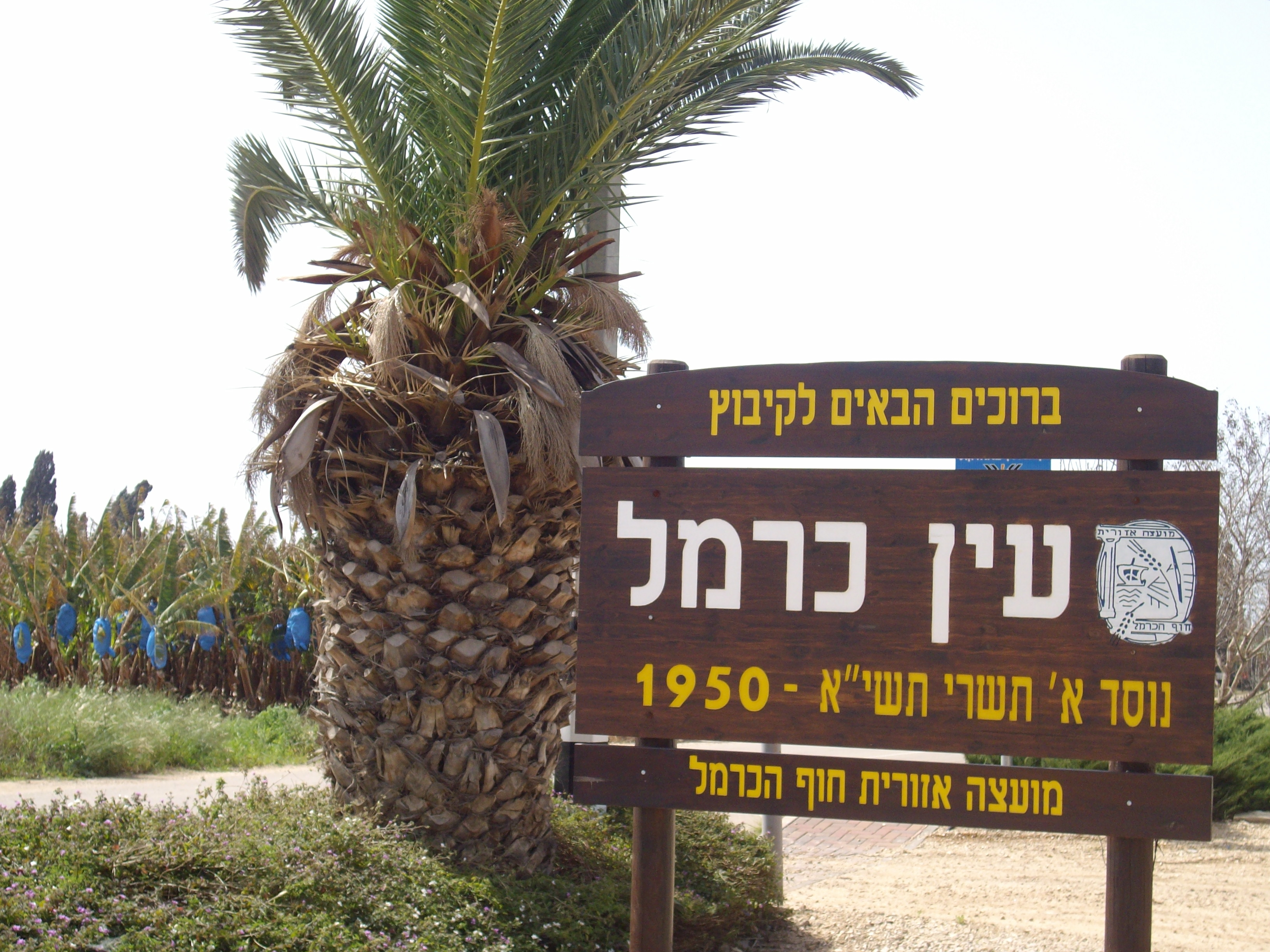 שלט בכניסה לקיבוץ עין-כרמל